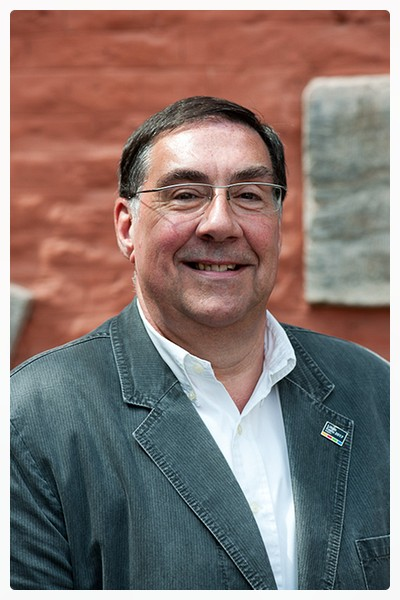 Maurice Mottard Député - Bourgmestre